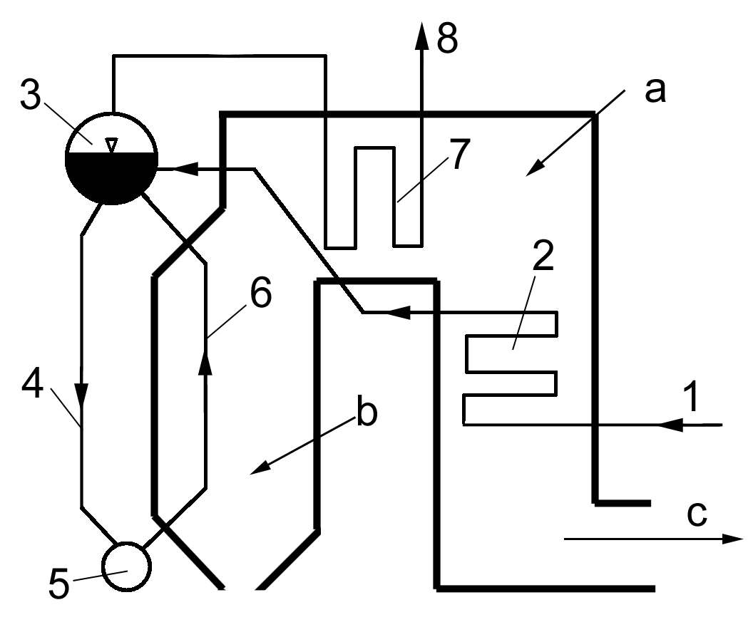 Naturumlauf